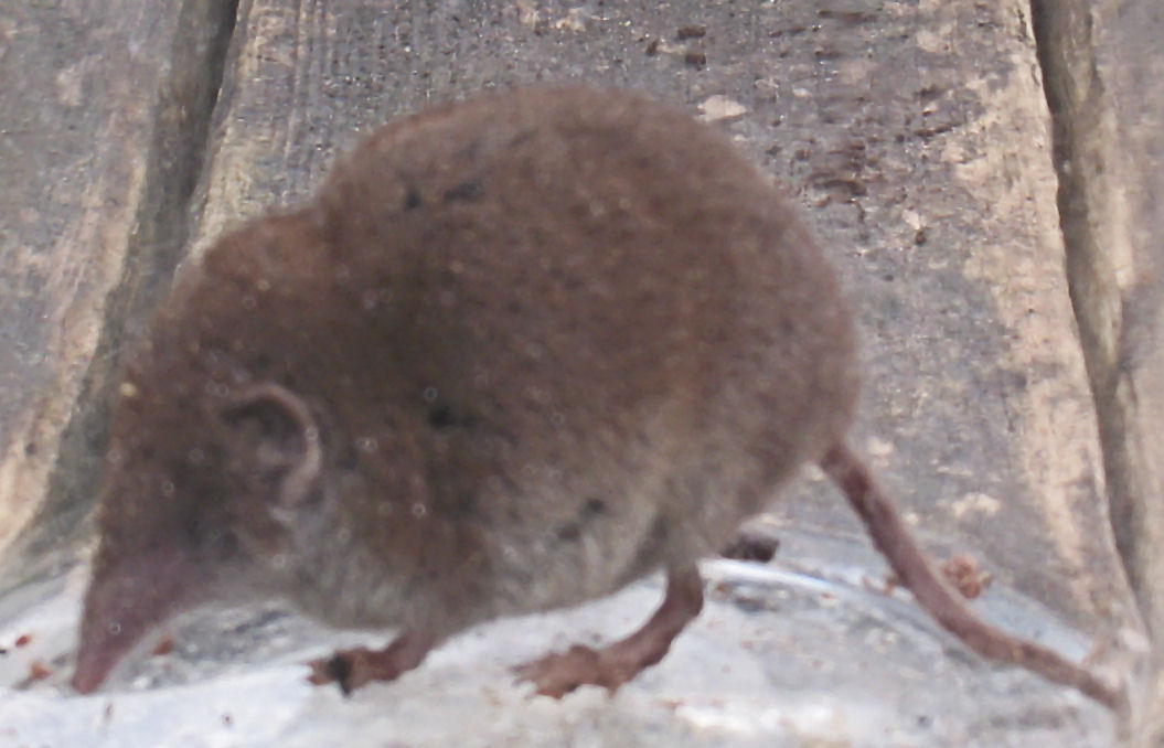 (Huisspitsmuis) Crocidura russula